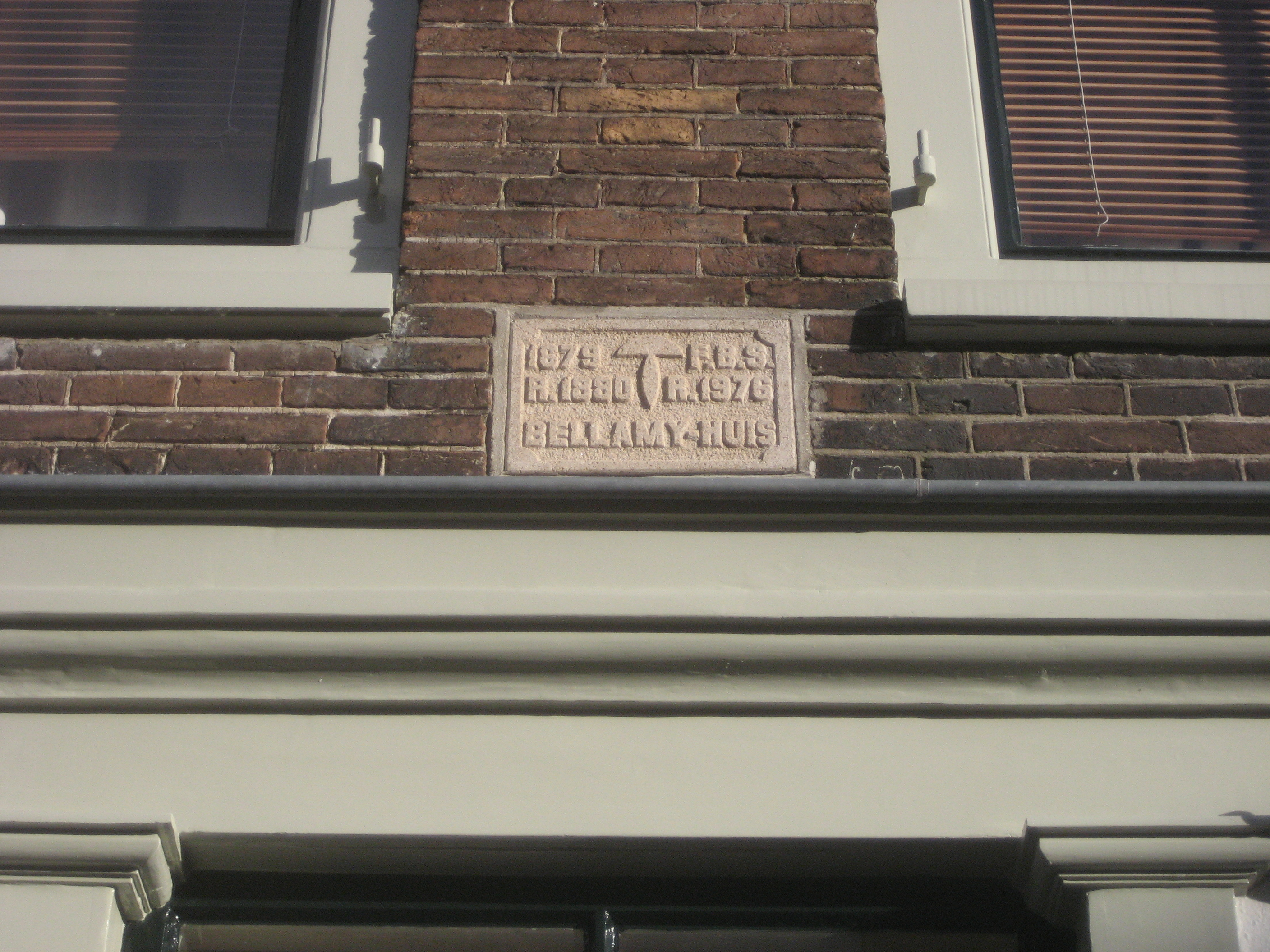 Bellamy-huis, Lange Nieuwstraat 18, Utrecht (Nederland). Gedenksteen. Tekst: "1879 a 1800. FBS a 1976. Bellamy-huis". In dit huis woonde ook patriot Quint Ondaatje.